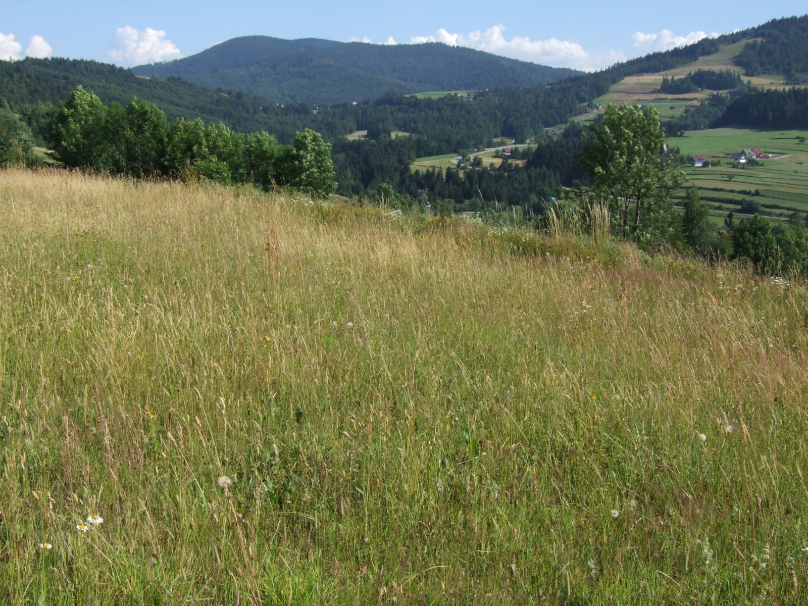 U góry Gorc, pod nim Przełęcz Przysłop, z jej prawej strony Jaworzynka. Widok ze zboczy Cyrkowej Góry